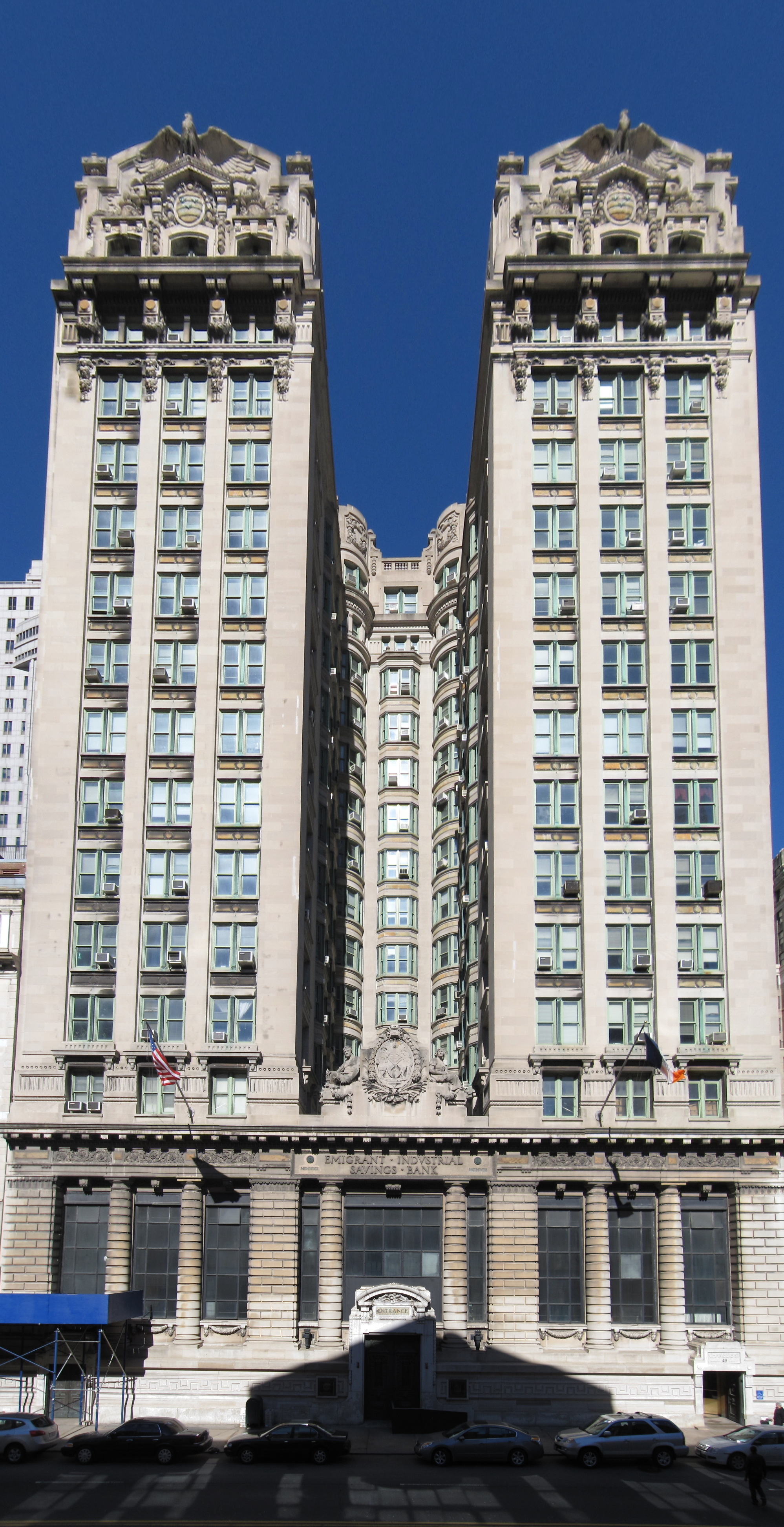 Emigrant Industrial Savings Bank